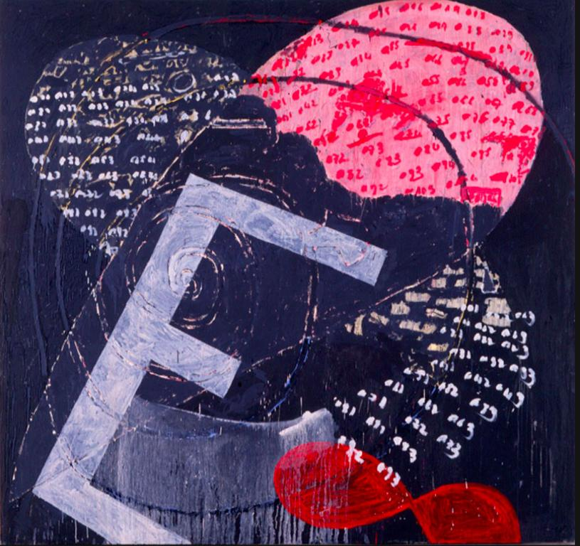 peinture